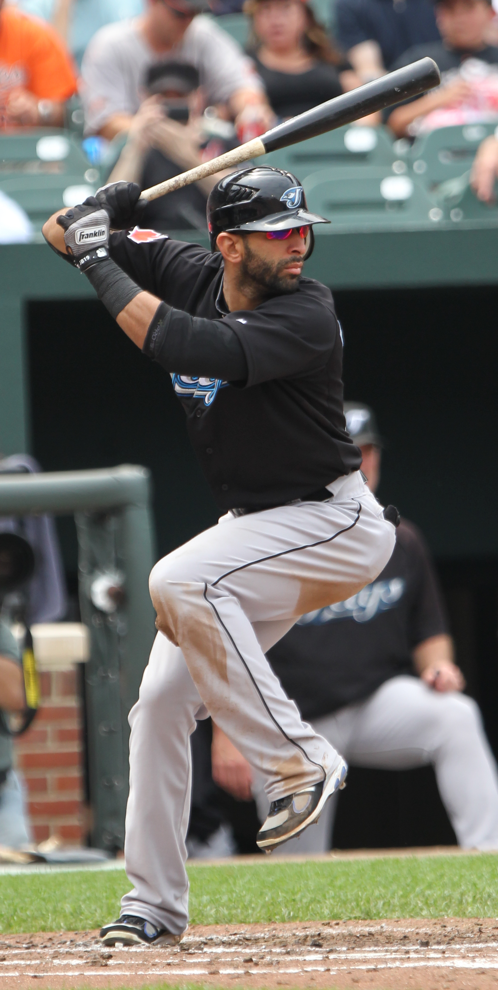 José Bautista